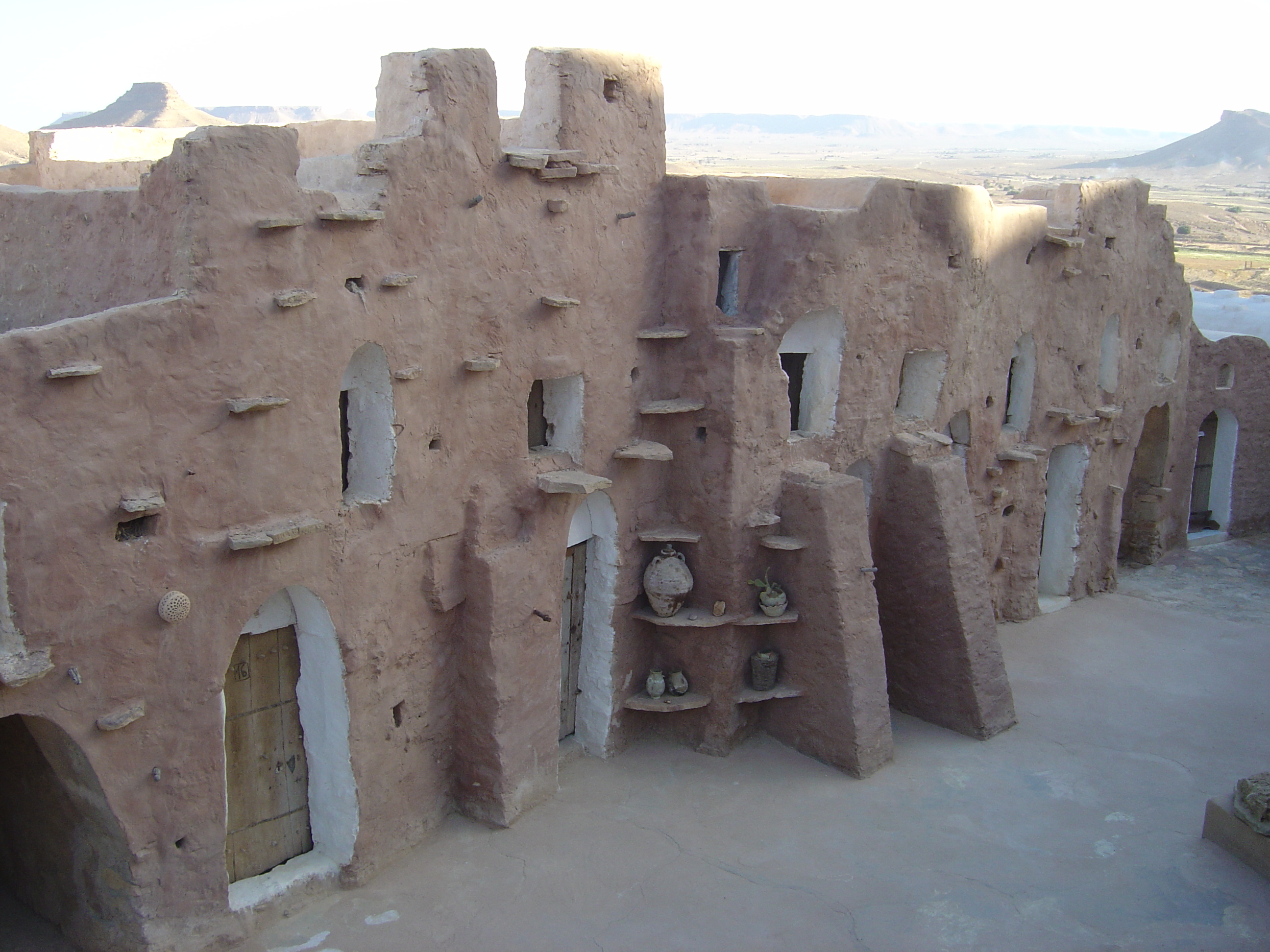 Origine: Oeuvre personnelle Auteur: Adel BRAHEM Lieu: Ksar Douiret (Village antique) Date: 7 avril 2006 Commentaire: Ksar Berbère Appareil photo: Sony P10